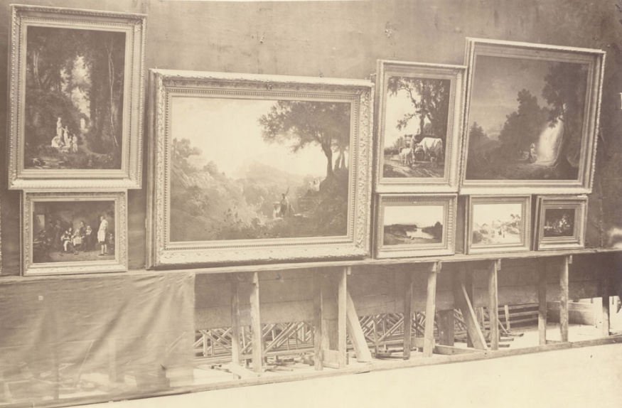 Un mur du salon de 1866 avec des œuvres de Van Marcke, Emile (peintre) Voir Marcke de Lummen; Teinturier, Victor (peintre); Sebron, Hippolyte (peintre); Paris, Camille (peintre); Jacquemart, Nélie (peintre); Gibert, Adolphe (peintre); Fauvel, Hippolyte (peintre); Boyer, Auguste (peintre); Christ (personnage du Nouveau Testament)